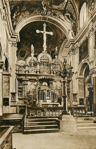 Hildesheim, Dom, Blick aus dem Langhaus zum Chor: Lettner, davor Mariensäule; um 1910